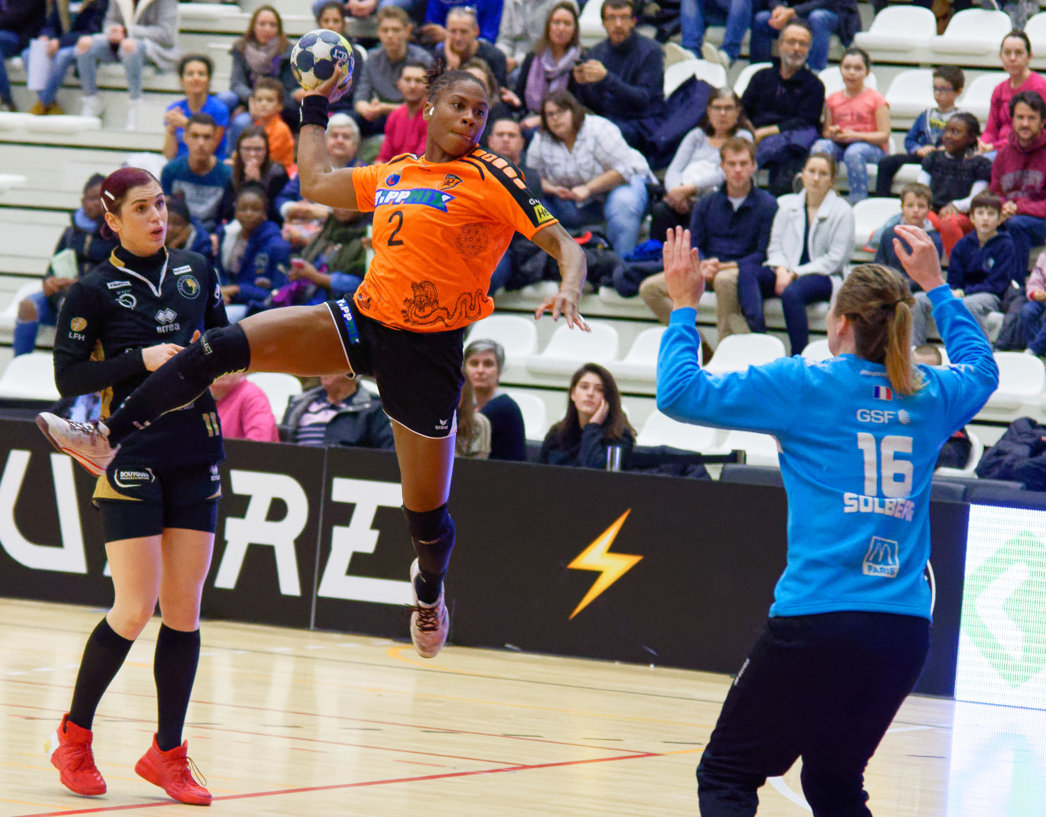 Rencontre retour du 3e tour de la coupe EHF, Issy Paris Hand / Erd. A Issy Les Moulineaux, le 18 novembre 2017.